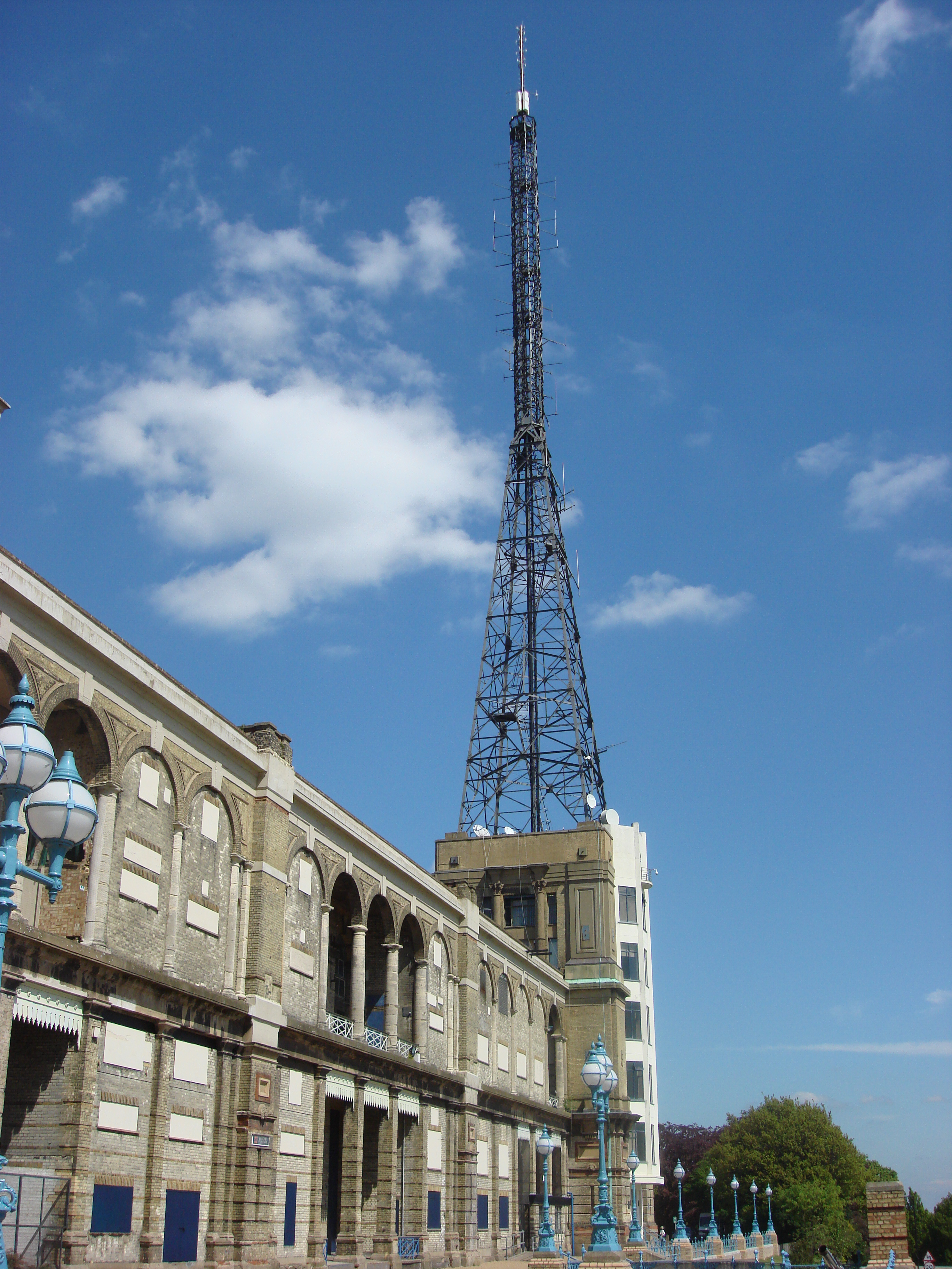 Alexandra Palace